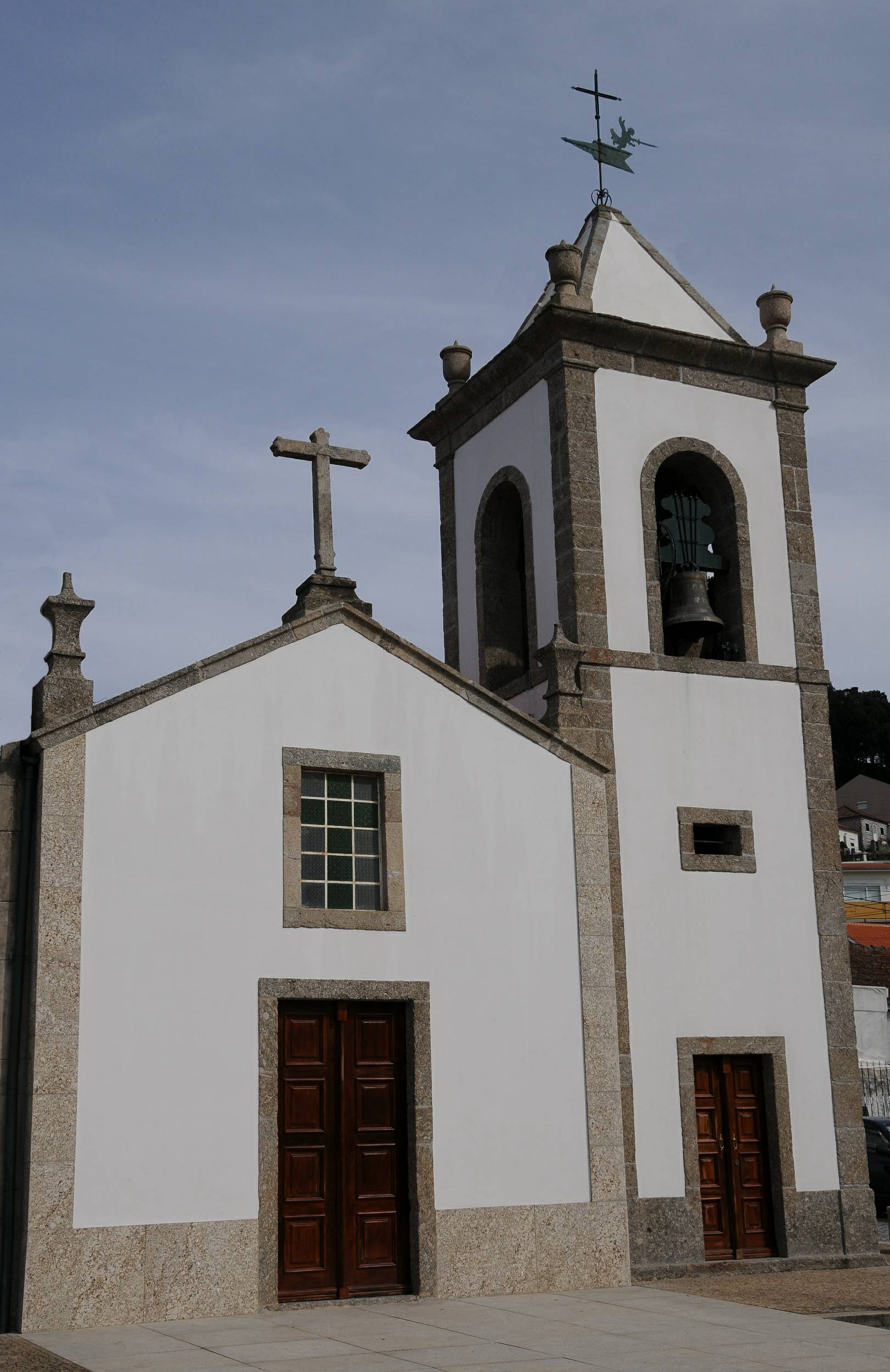 Nogueiro Church, in Braga, Portugal